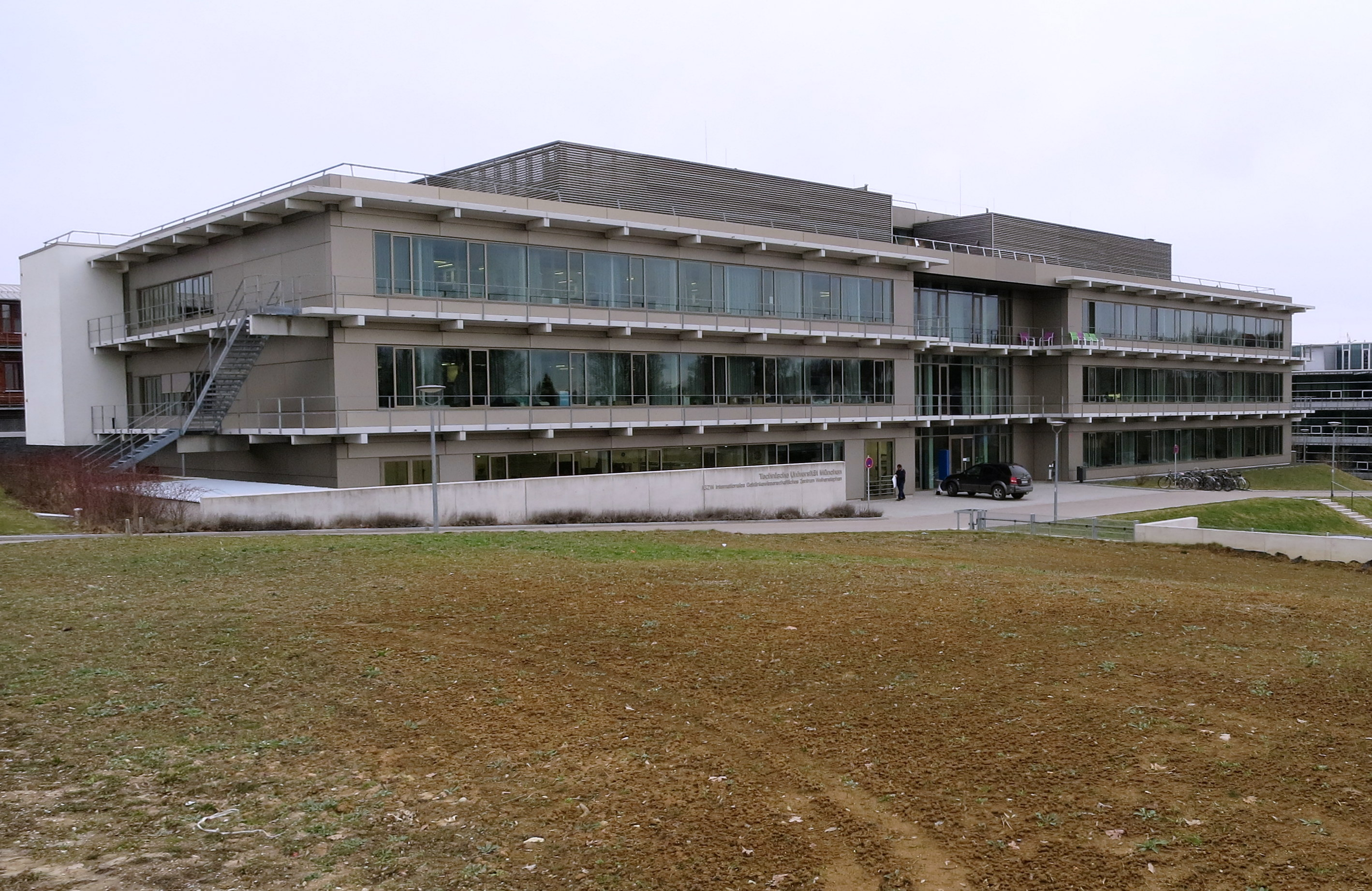 Internationales Getränkewissenschaftliches Zentrum Weihenstephan